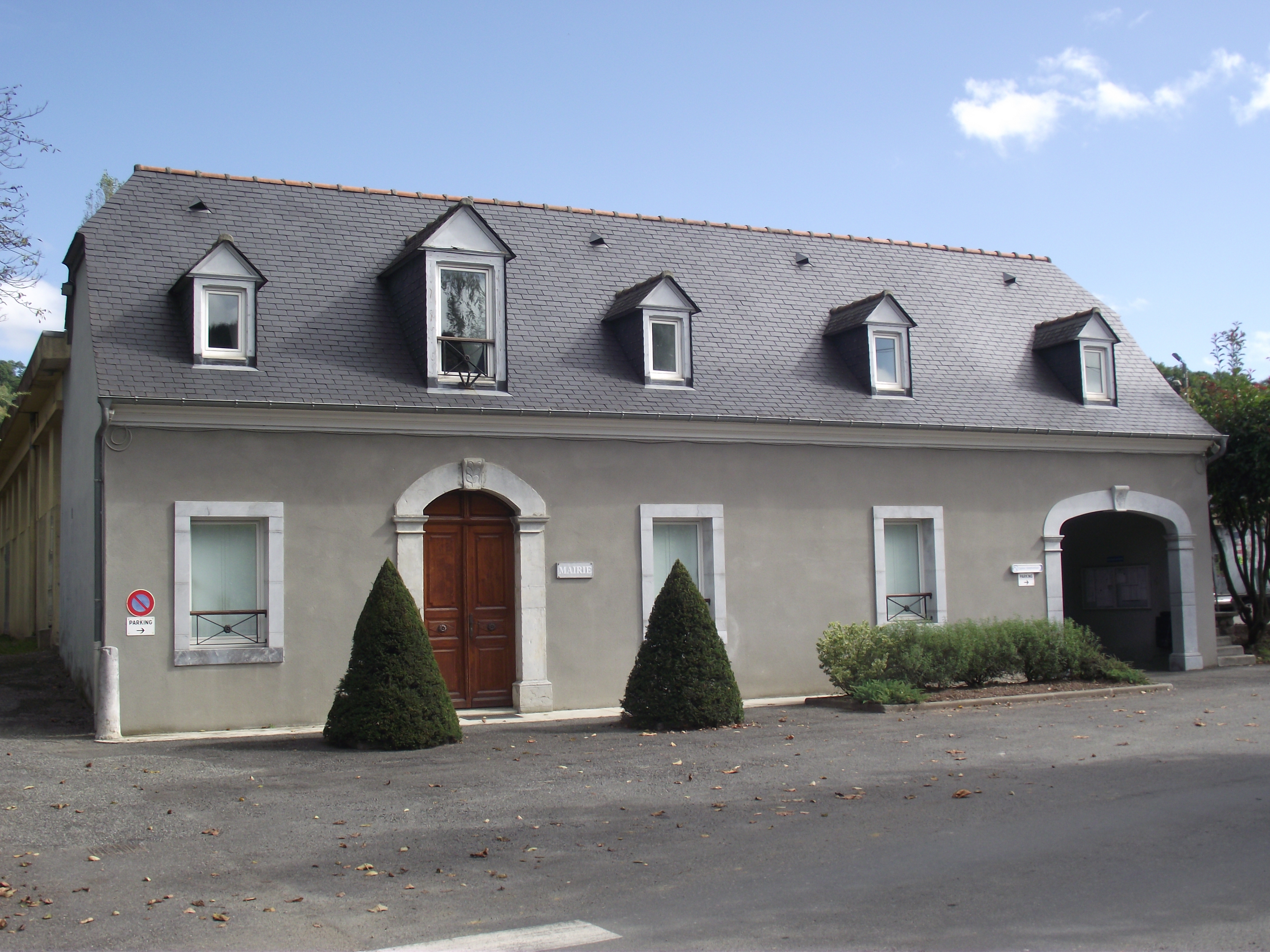 Mairie (Orincles, Hautes-Pyrénées, France)